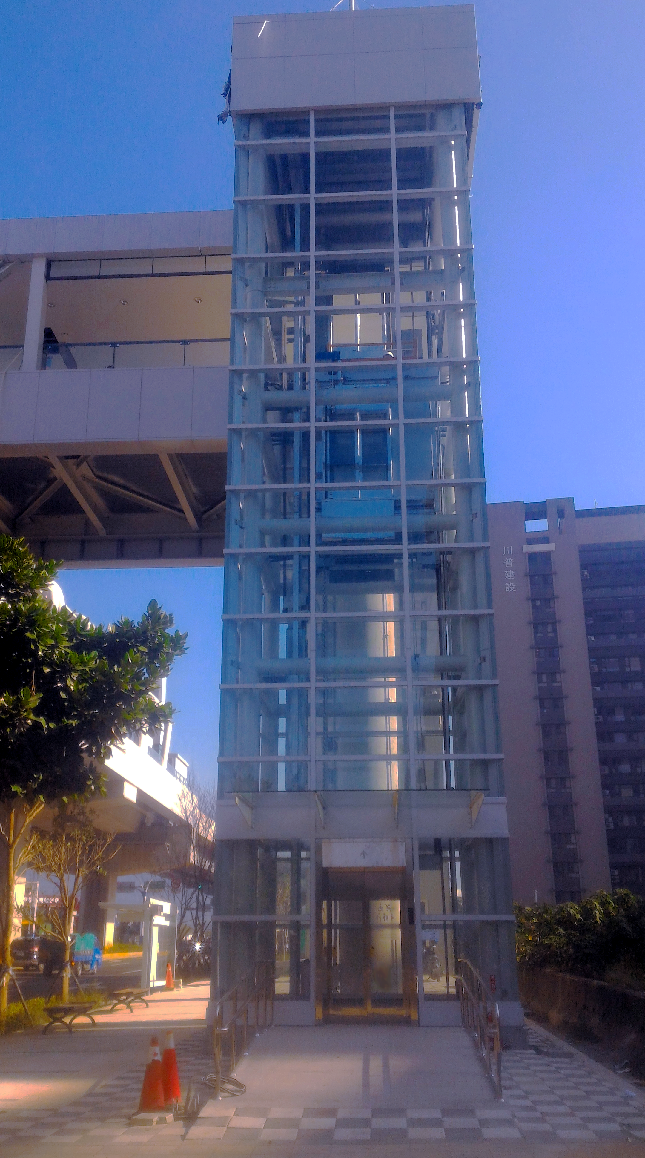 The elevator of Danjin Beixin Station, Dec 2018